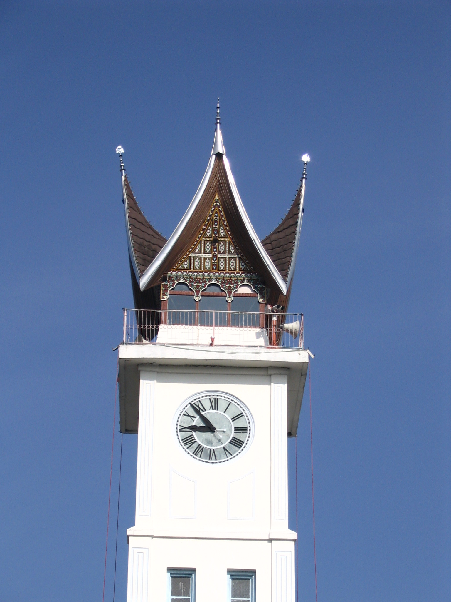 Aspecto del techo de la torre del reloj, Bukittinggi, Sumatra Occidental, Indonesia.